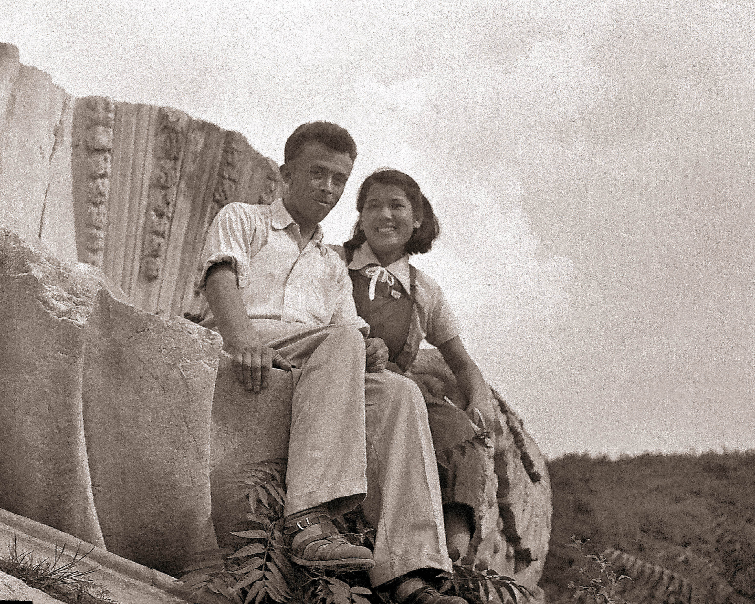 V rozvalinách rozsáhlého areálu letního paláce Jüan - ming - jüan v Pekingu roku 1952.